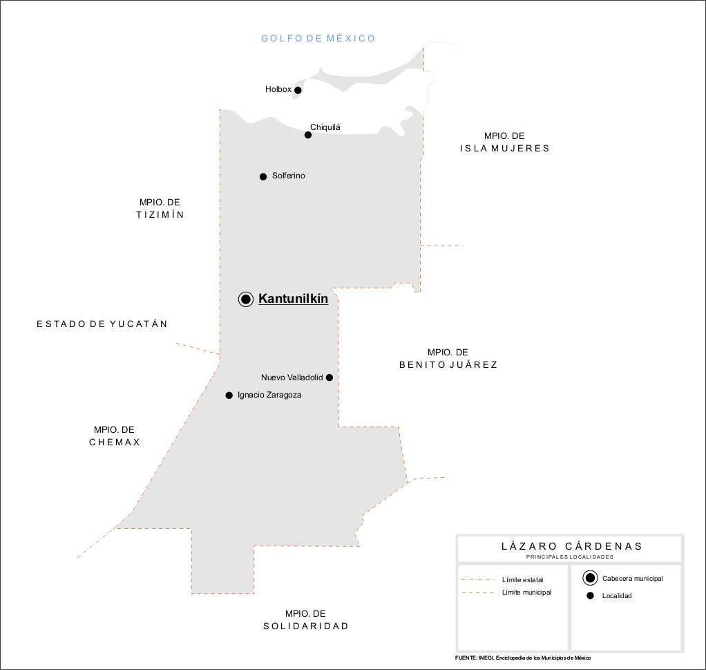 Mapa de las principales localidades del Municipio de Lázaro Cárdenas en el estado de Quintana Roo, México.